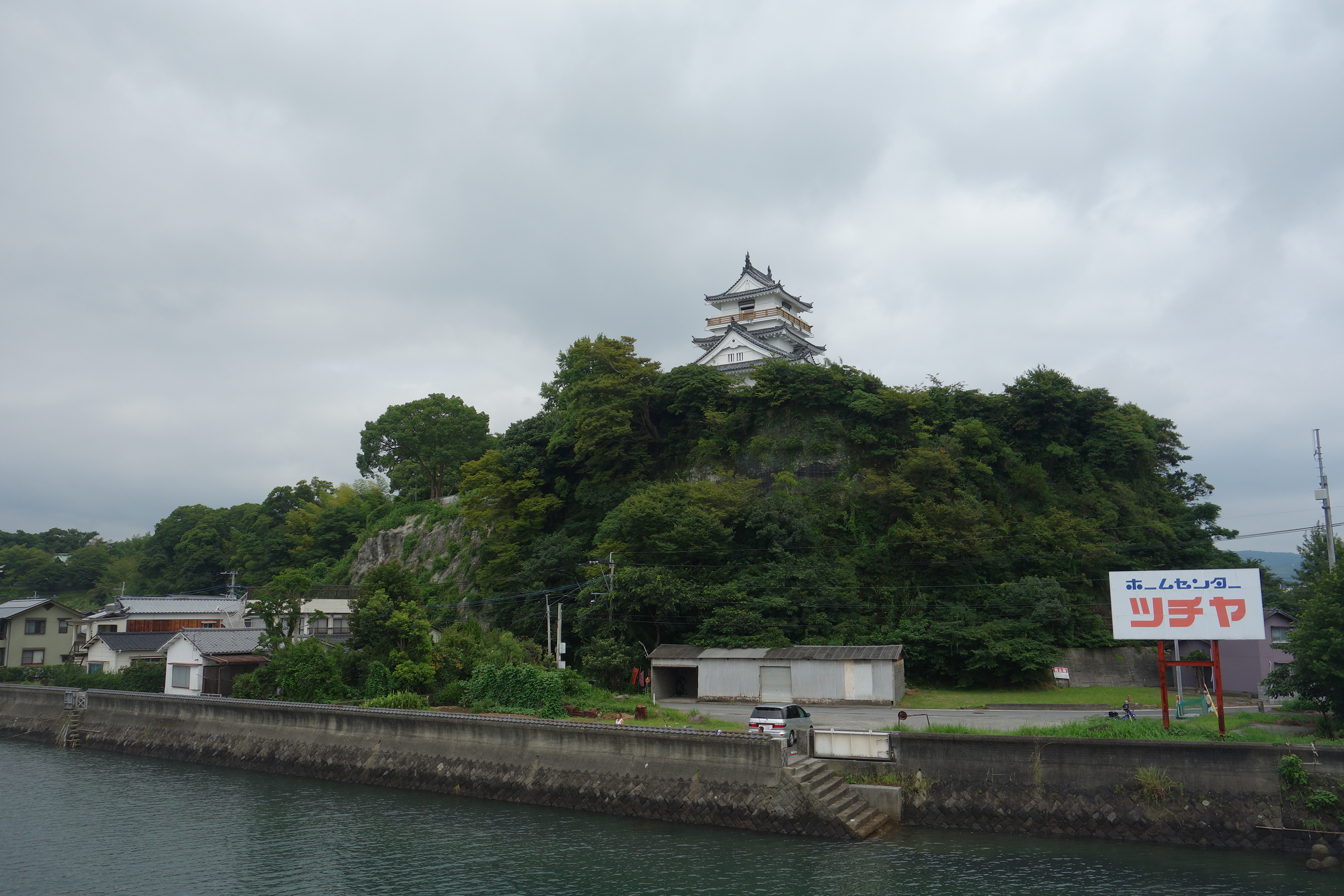 杵築城と台山